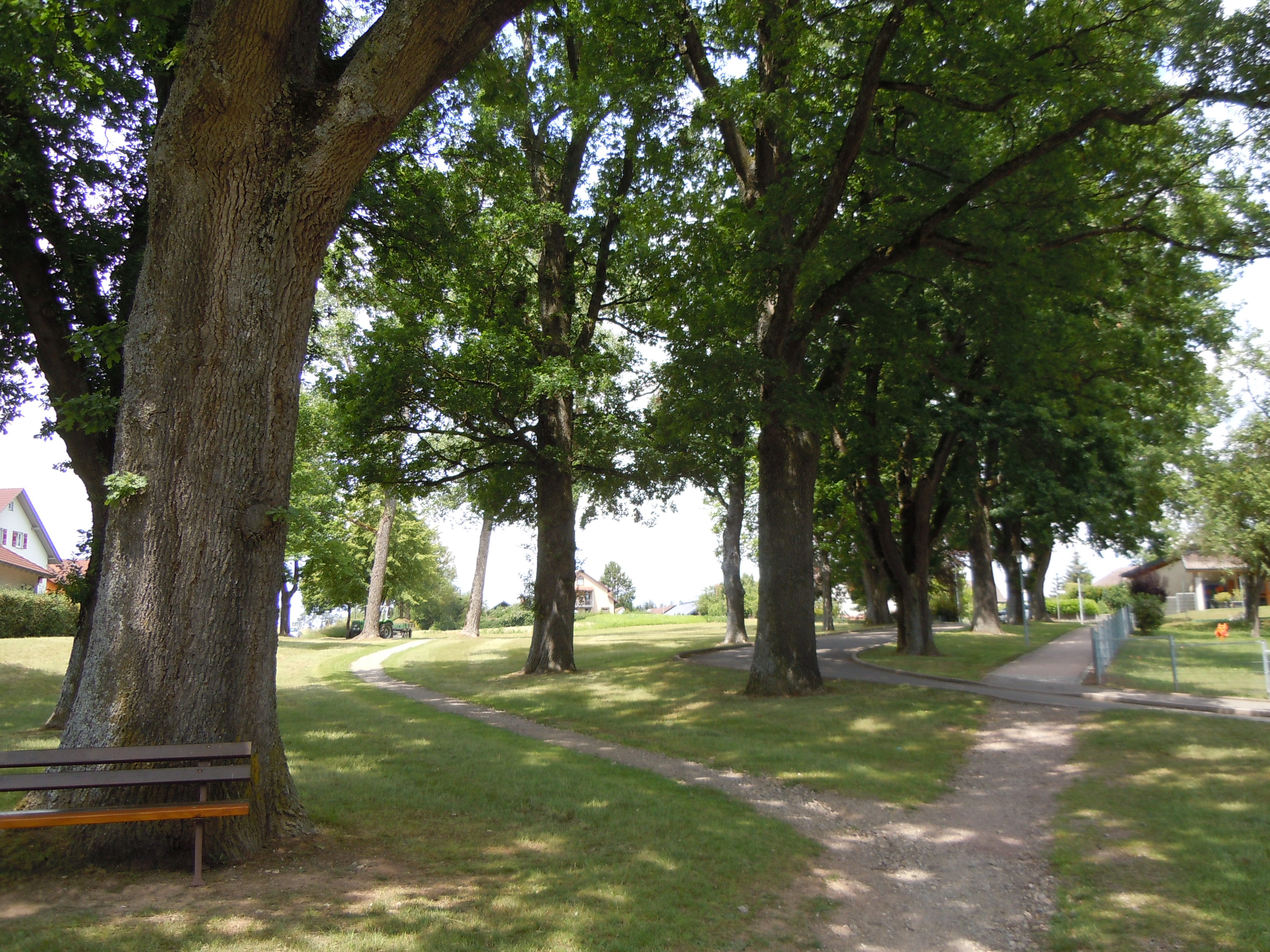 Flächenhaftes Naturdenkmal "Egenhauser Eichenhain" (Schutzgebiets-Nr. 82350220003) in Egenhausen.